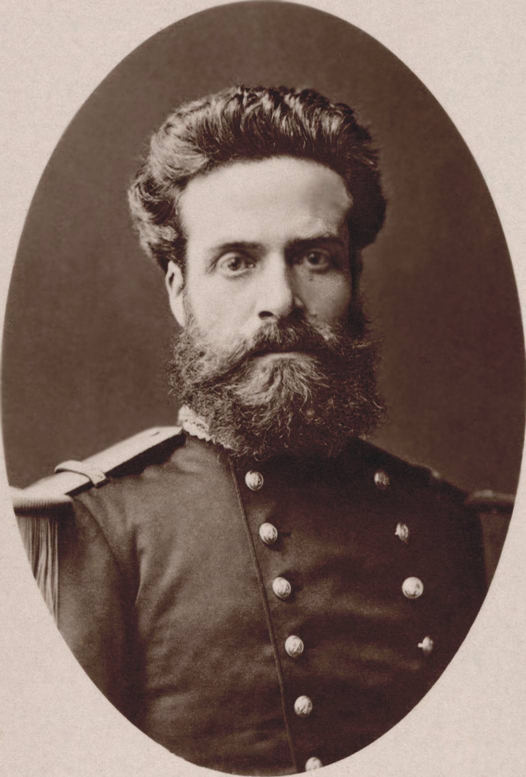 Armand Reclus (1843 - 1927), officier de marine et explorateur, photographie positive sur papier albuminé : d'après négatif sur verre ; 9,3 x 6 cm.